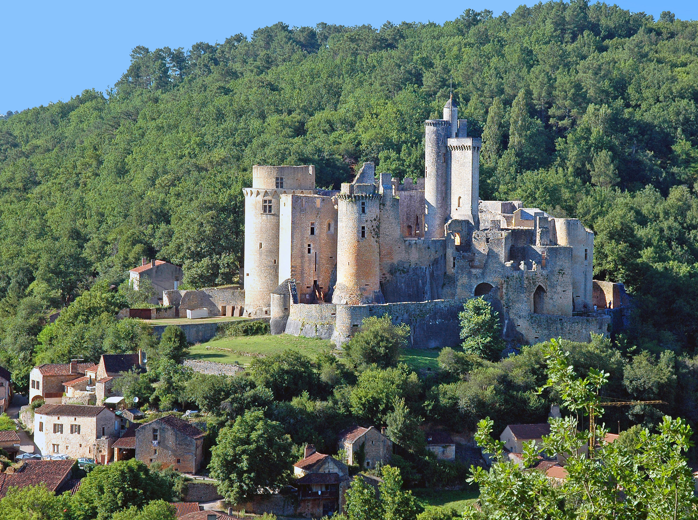 Château de Bonaguil